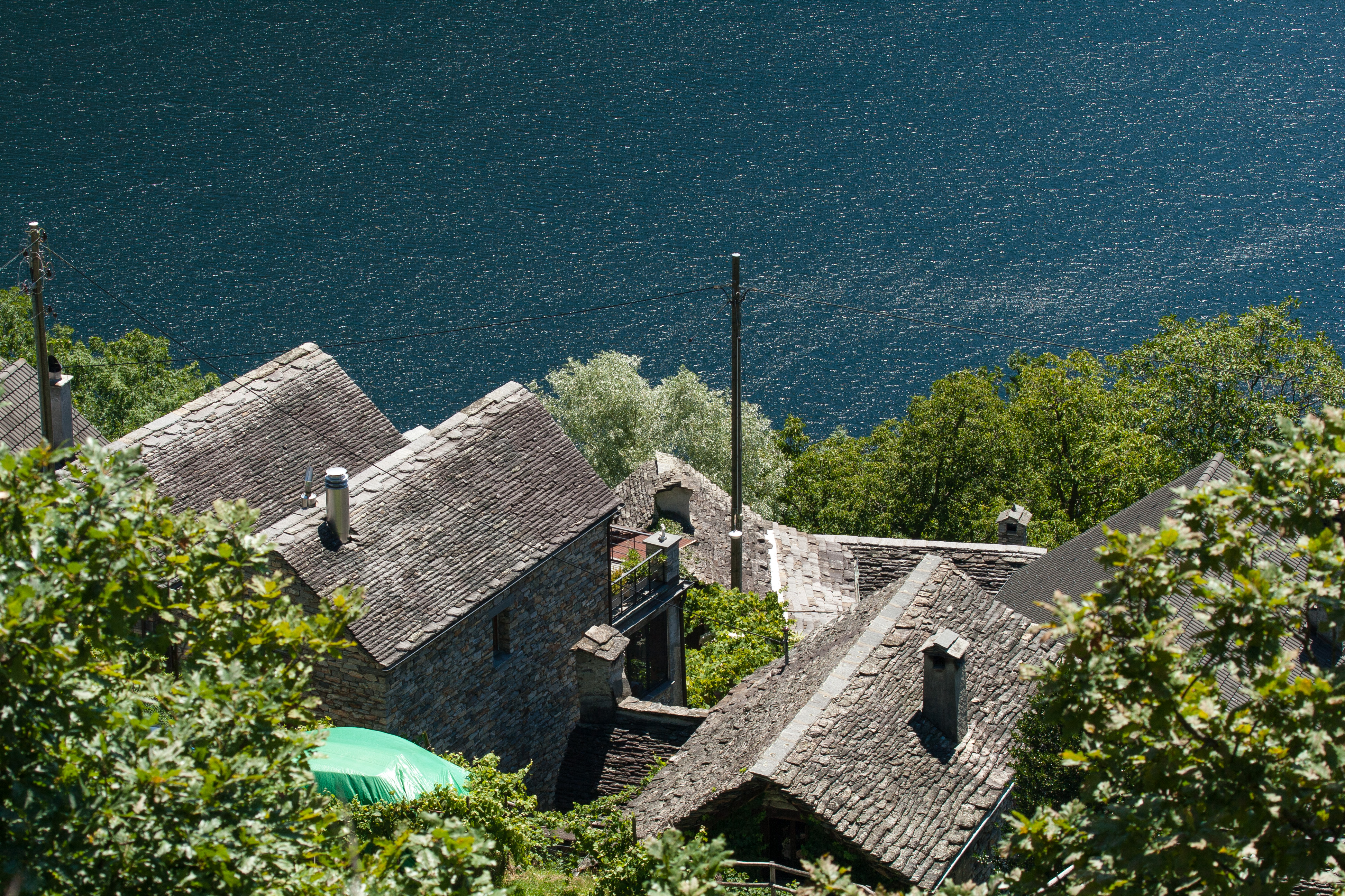 Blick von der Pfarrkirche Richtung Stausee